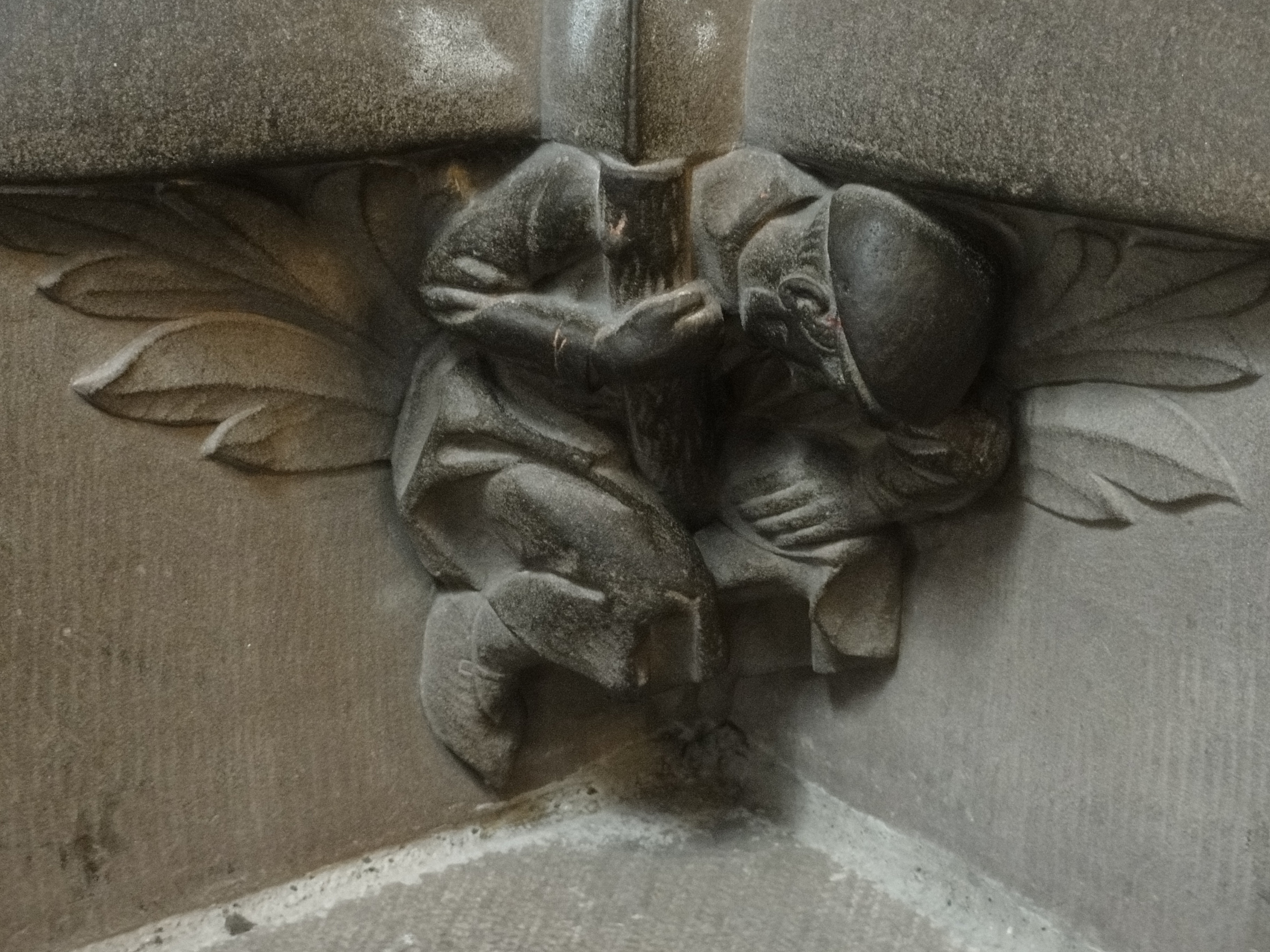 Alsace, Bas-Rhin, Cathédrale Notre-Dame de Strasbourg (PA00085015). Atlante symbolisant les travaux de consolidation des fondations (début du XXe), initiés par l'architecte Johann Knauth. Pour l'explication, Knauth